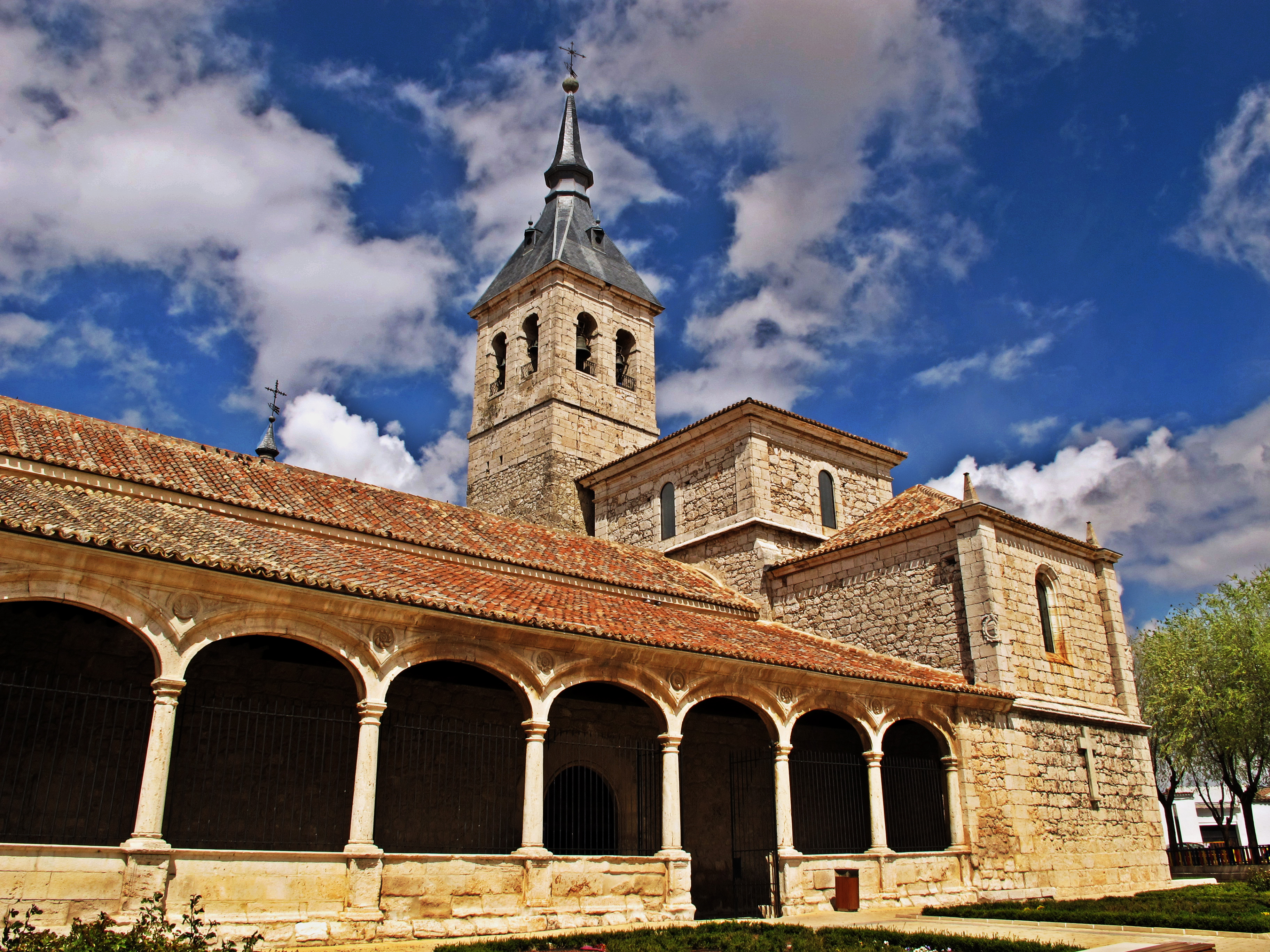 bueno hice un hdr así de simple con este tutorial :))) como es natural la foto.... la foto 5.000 publica en flickr mia necesitaba un enfoque novedoso esta bastante bien sin "el hdr" pero .... no le queda mal, aveces no se logran los efectos deseados ....hahhahahaha Plateresco español del siglo XVI, Su principal singularidad está en el Claustro Porticado, de siete arcos y encarado al Sur, de acuerdo con los cánones arquitectónicos renacentistas.